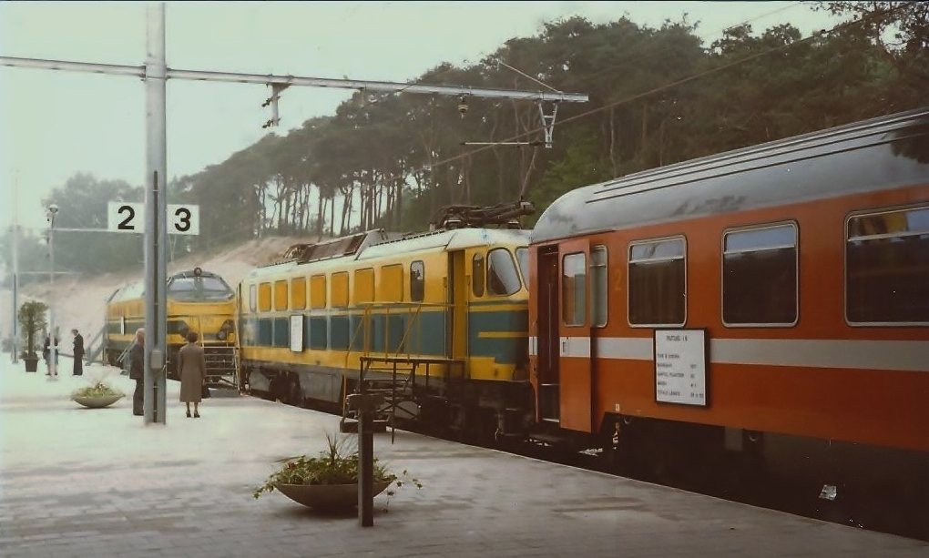 Bovenzicht van het nieuwe station Genk tijdens de inauguratiedagen. Er was divers spoormaterieel tentoongesteld.